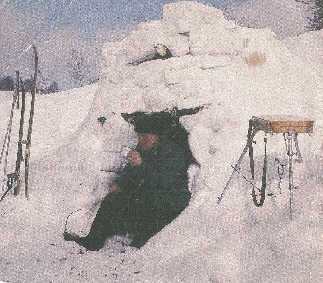 Хребет Басеги, фото 1986г.